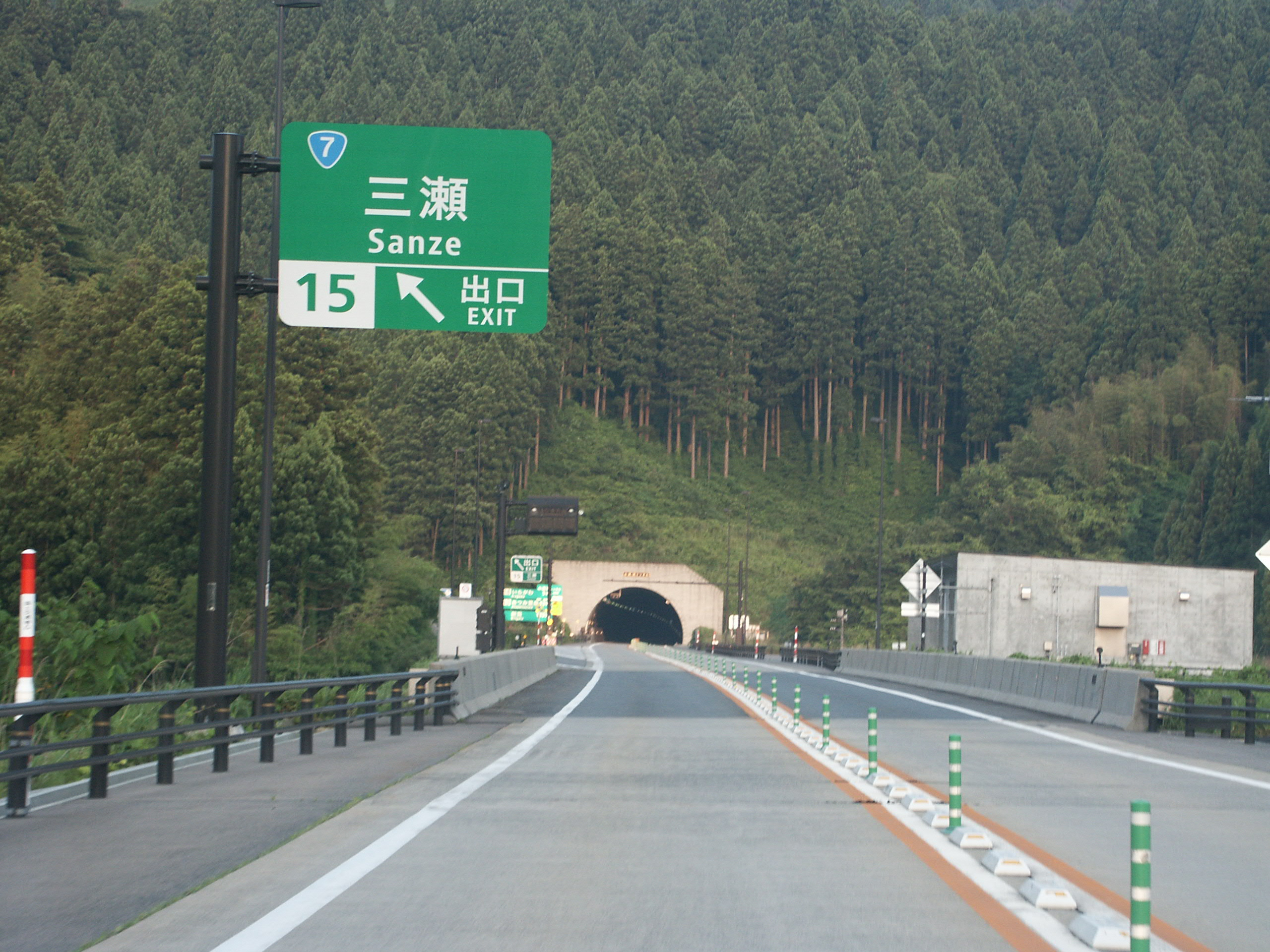 日本海東北自動車道三瀬IC出口付近